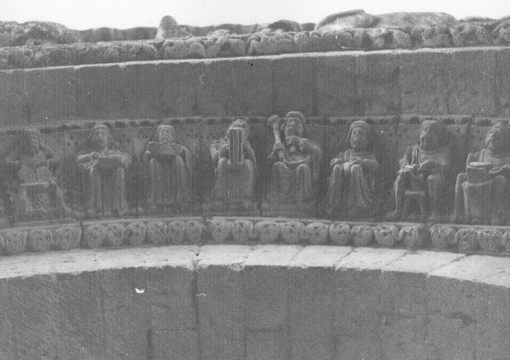 Iglesia de Santiago. Esculturas arquivolta 1971 - Carrión de los Condes (Palencia) - Fotografía. Papel 750 x 105 mm B/N